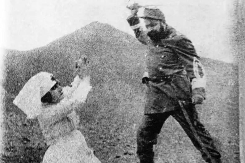 Anuncio de la pelicula paginas heroicas en Peru 1926